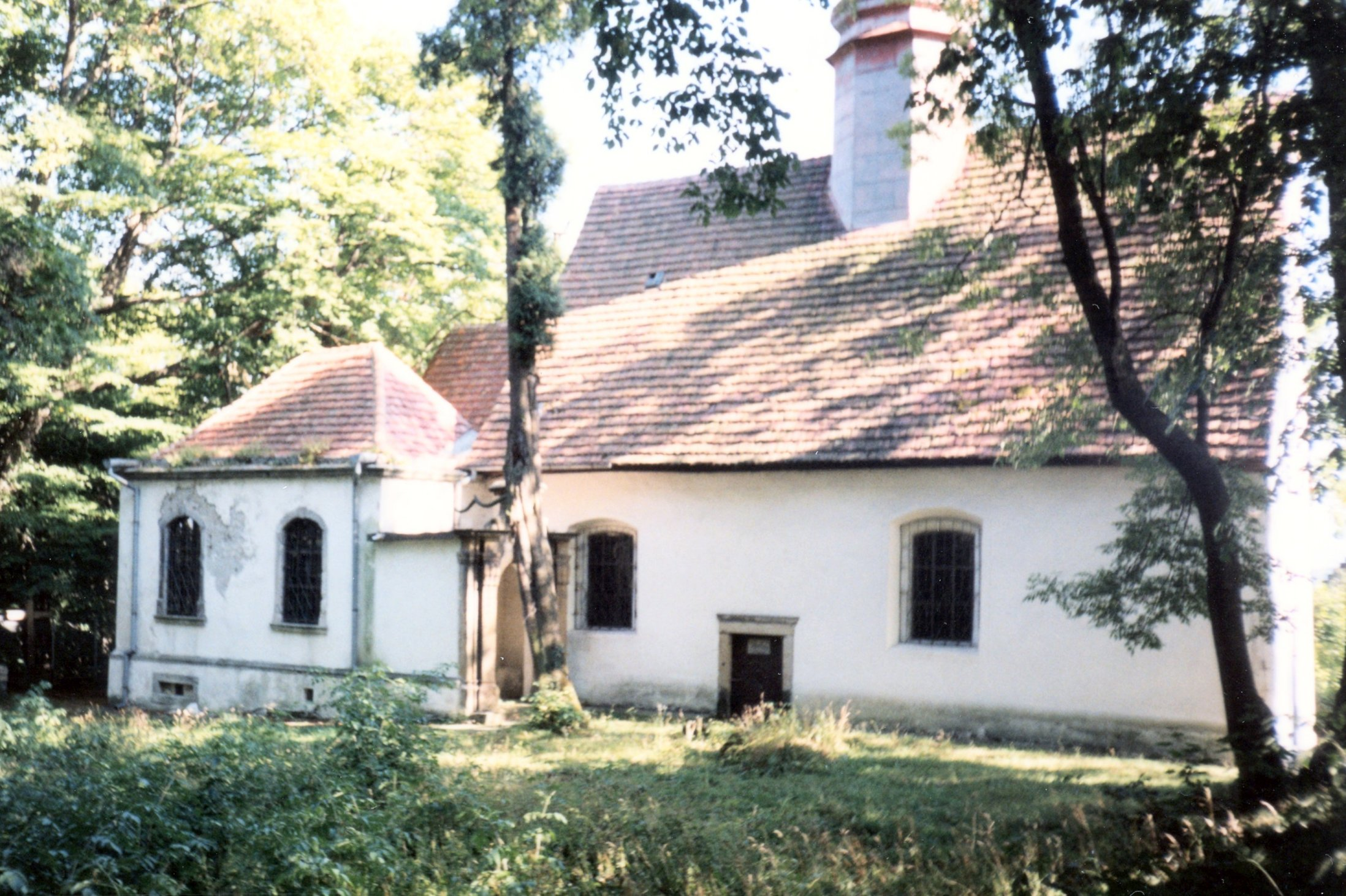 Kościół św. Jadwigi we Wleniu, na wzgórzu zamkowym